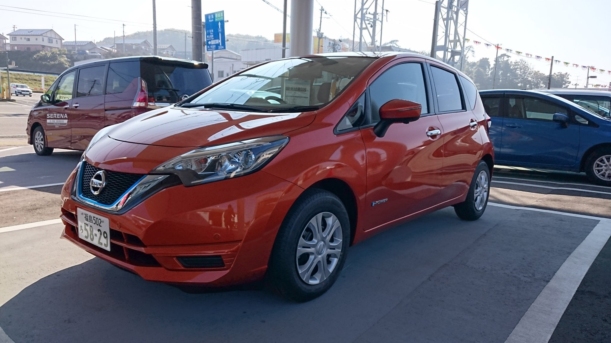 E12 日産ノート e_power